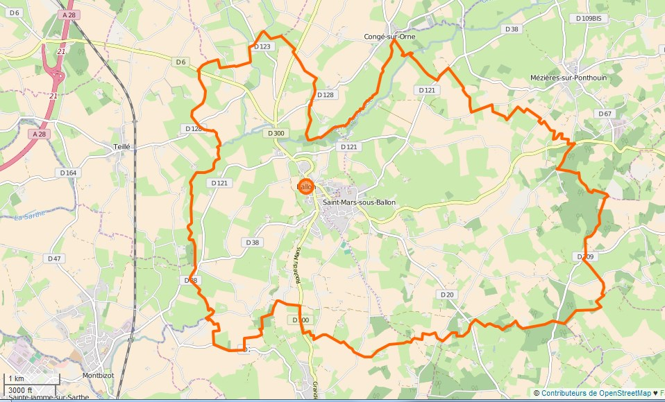 Ballon-Saint-Mars Limite communale This map may be incomplete, and may contain errors. Don't rely solely on it for navigation.